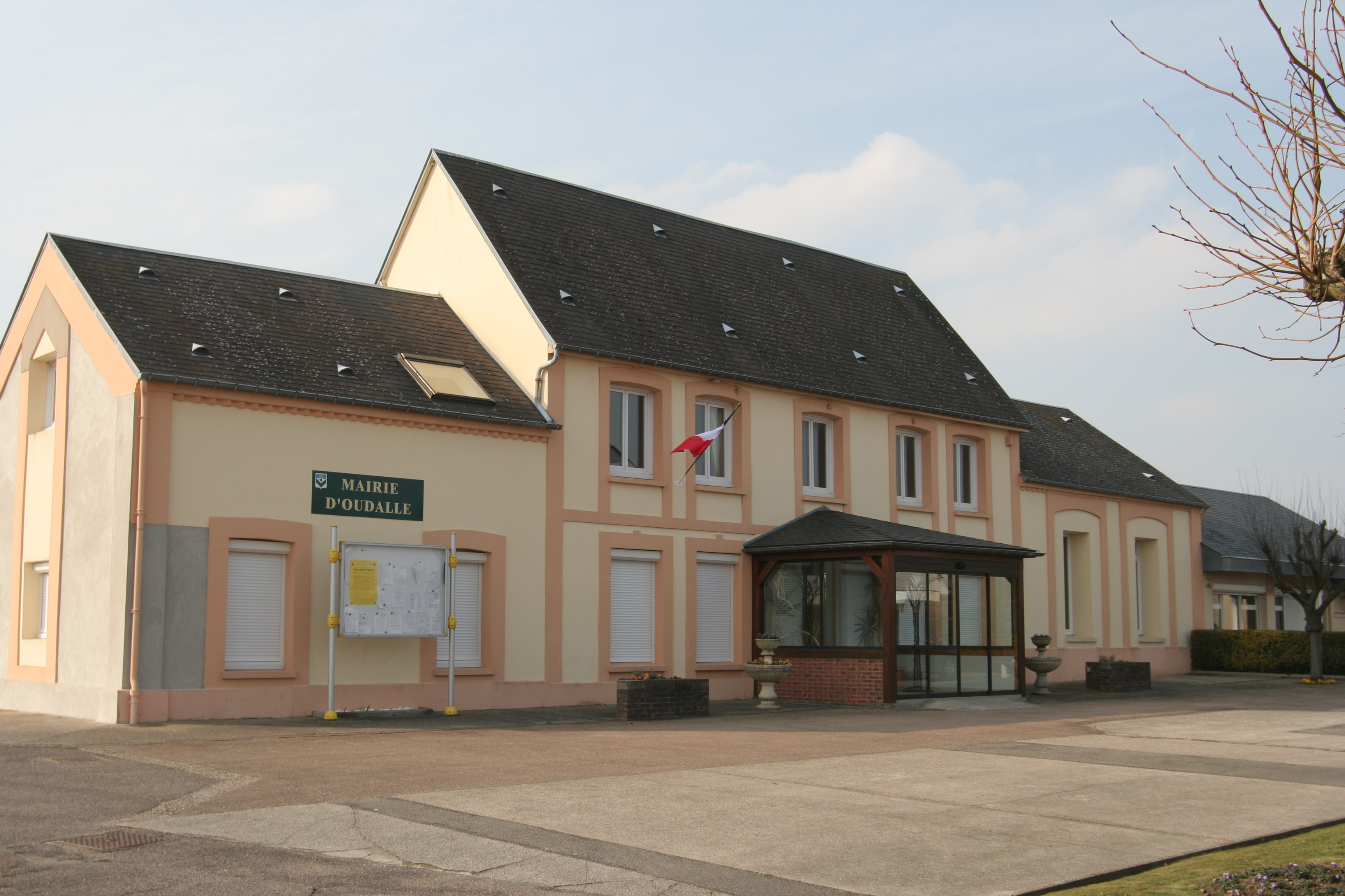 Mairie d'Oudalle.